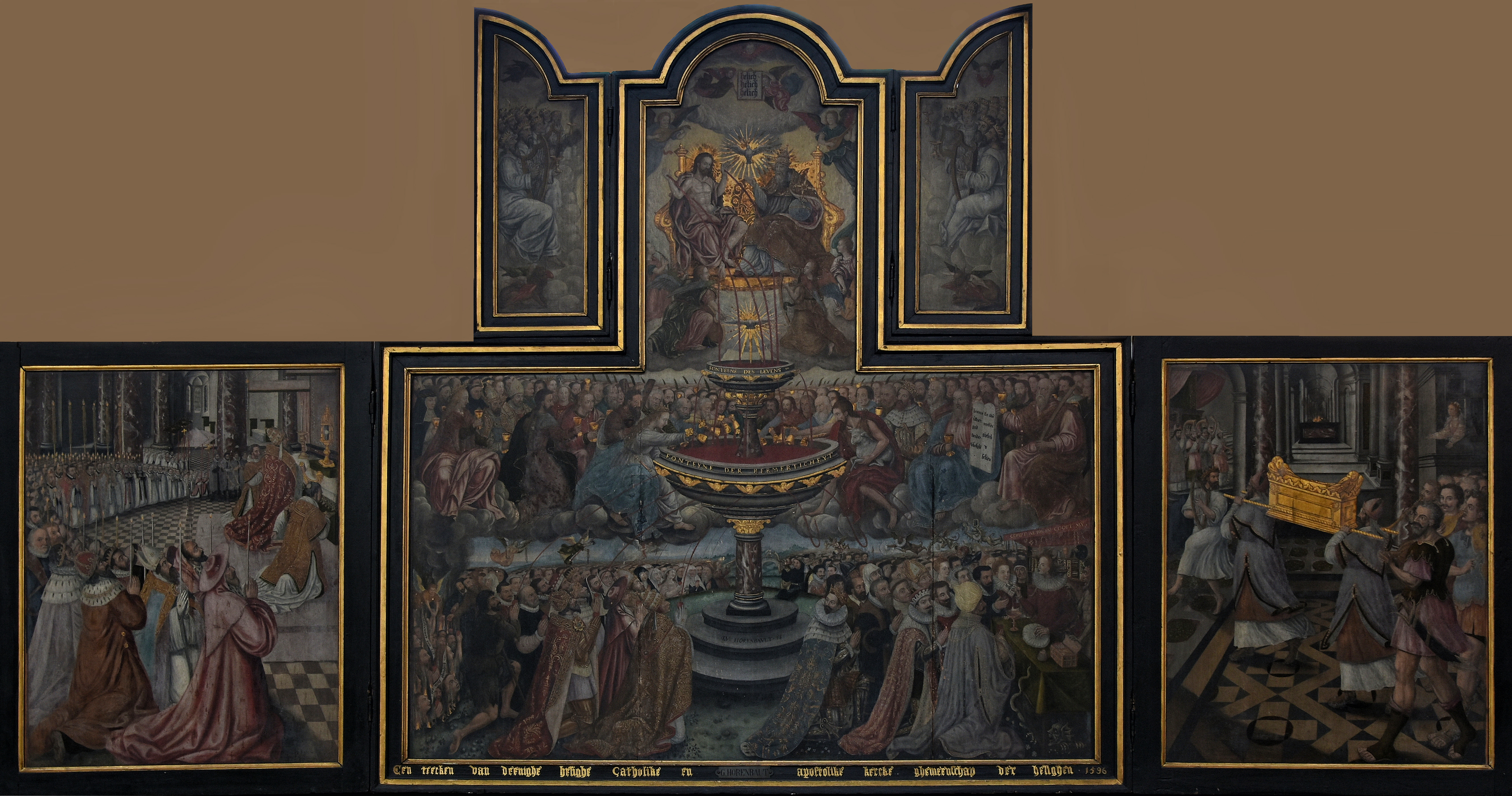 Lucas II Horenbout (c.1560-1626) De fontein des levens O.L.V. Ter Hoyekerk Gent 22-06-2019. Ter Hoyekerk Gent 21-06-2019 This photo of movable heritage has been taken in the Flemish Region